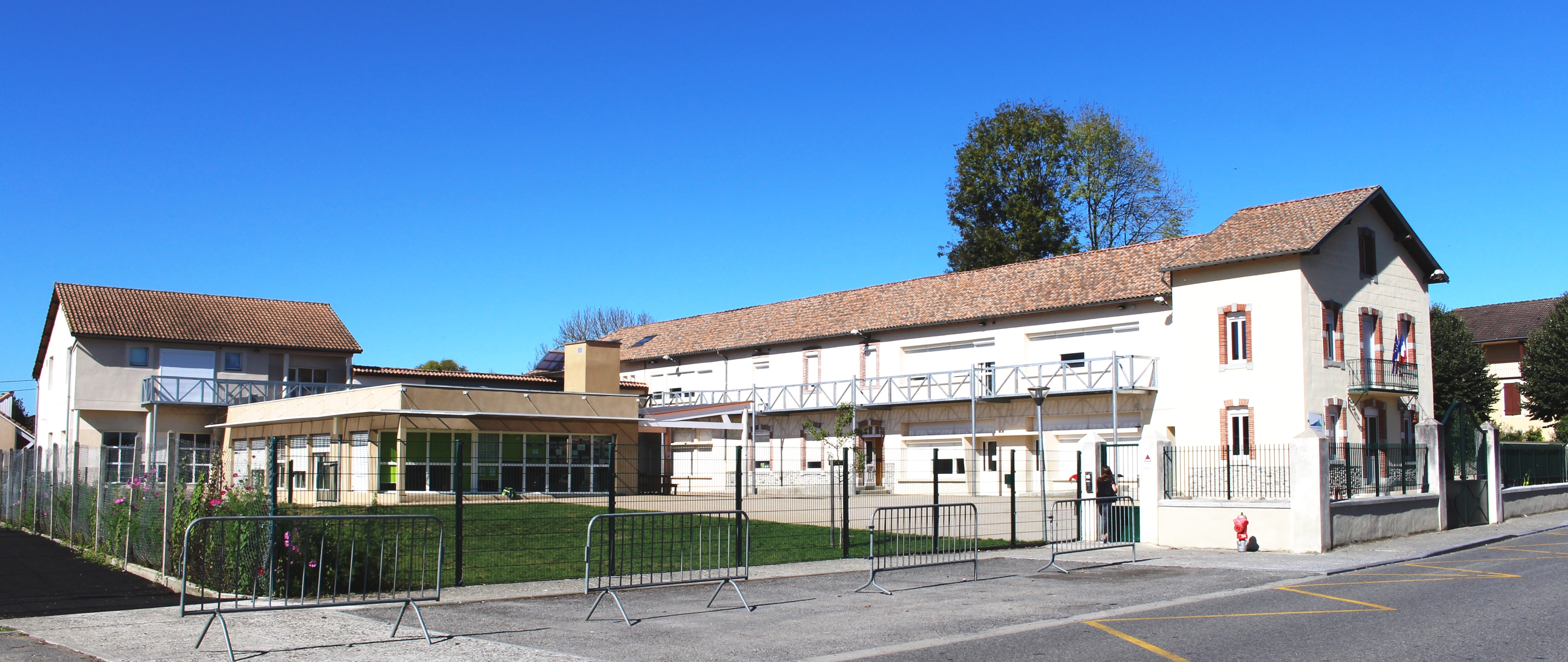 École de Saint-Laurent-de-Neste (Hautes-Pyrénées)